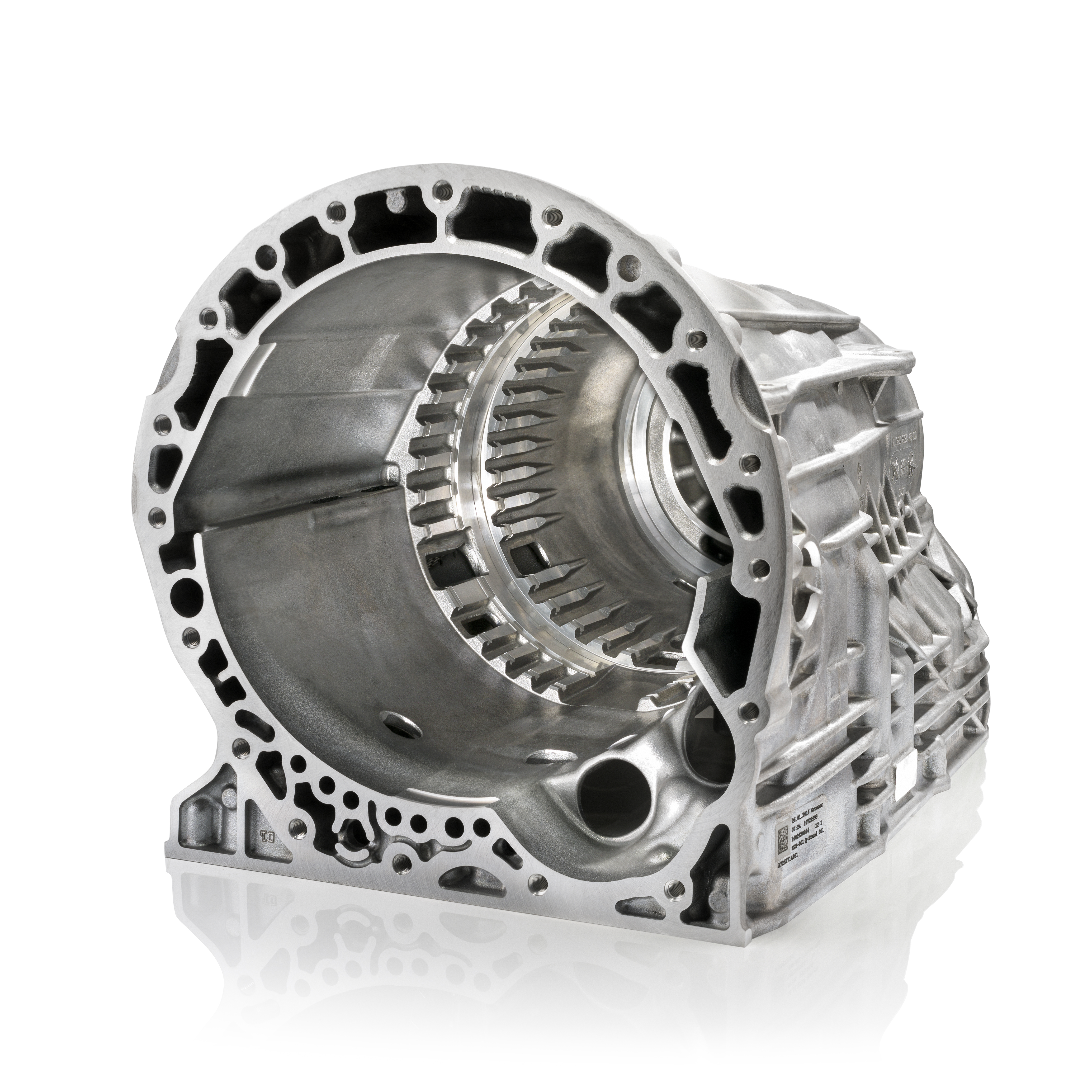 Ein PKW-Getriebegehäuse aus Magnesium - erstellt im Druckgussverfahren.